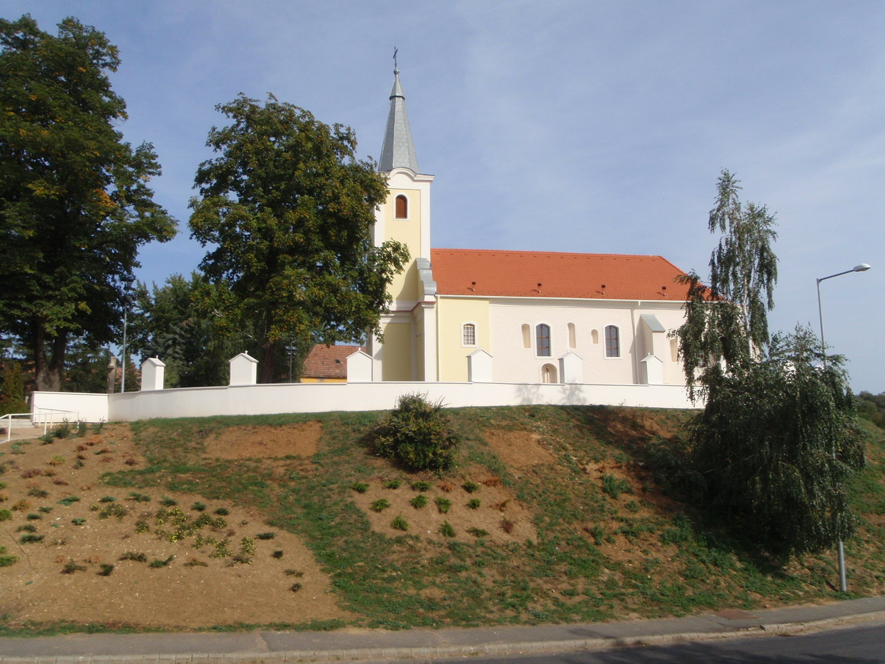 Csehimindszent Mindenszentek templom és kálvária